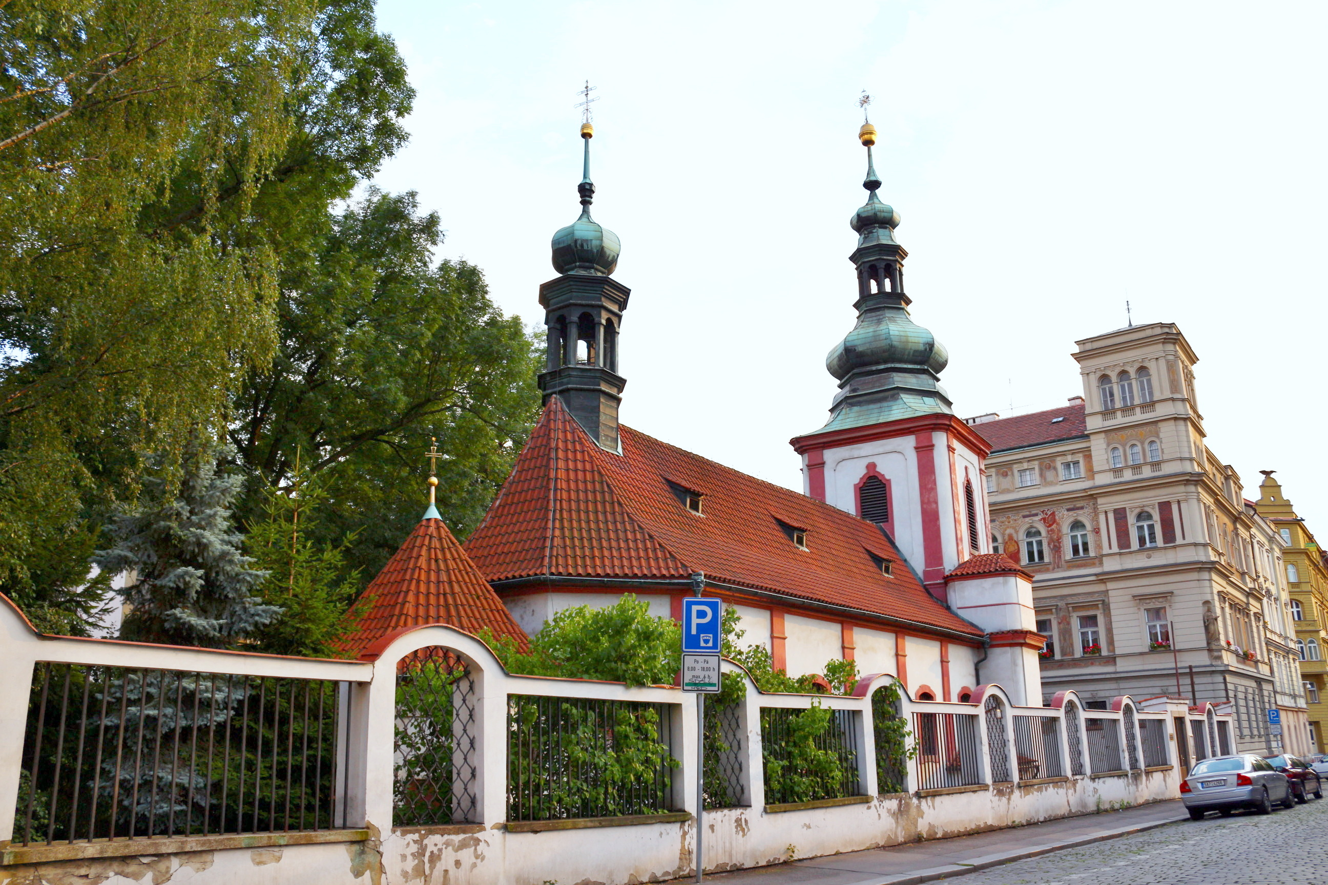 Kostel Nejsv. Trojice v Podskalí